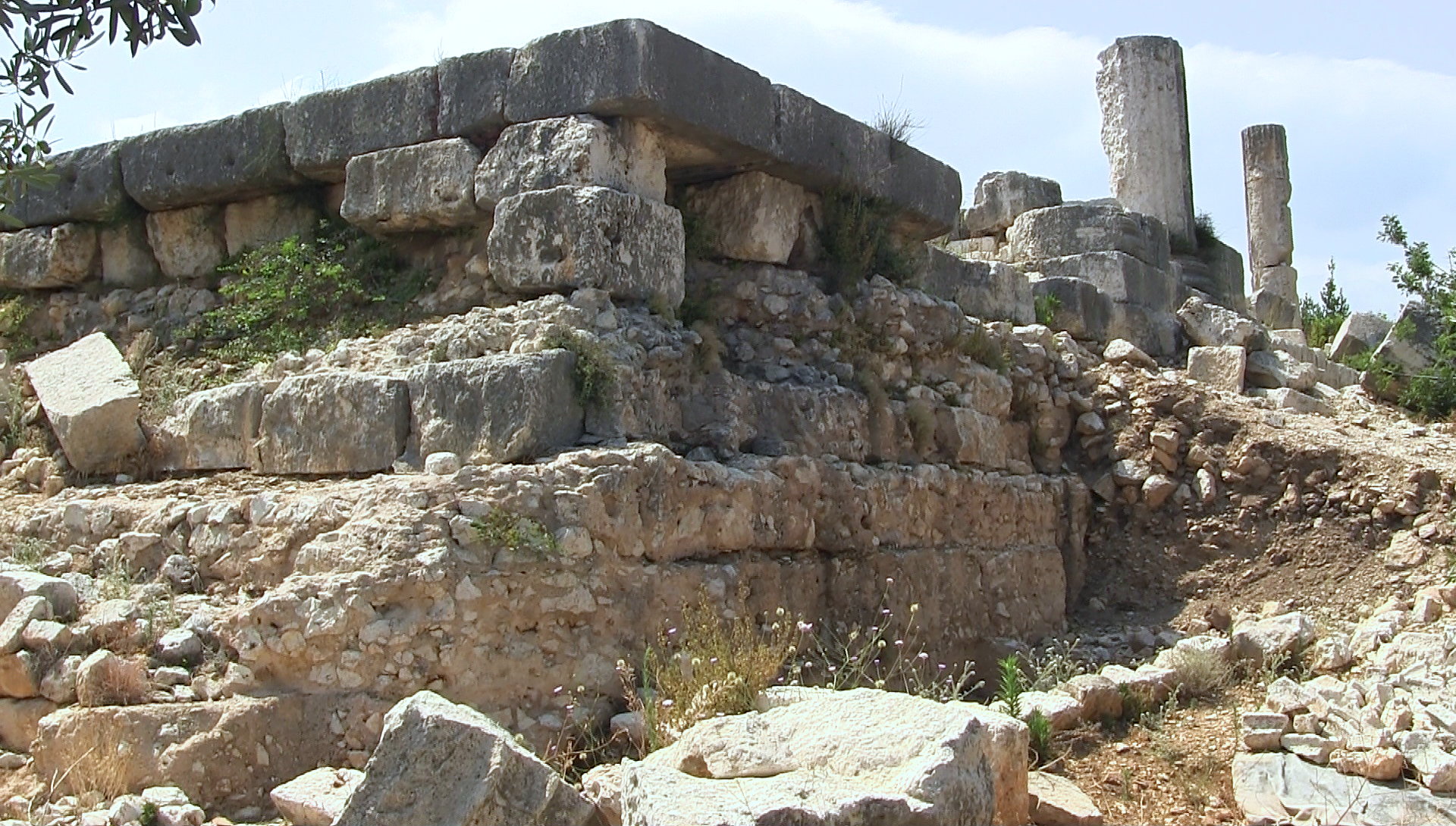 Elaiussa Sebaste, antike Stadt bei Erdemli, Südtürkei, römischer Tempel, Südostecke mit Opus Caementicum (Römischer Beton)